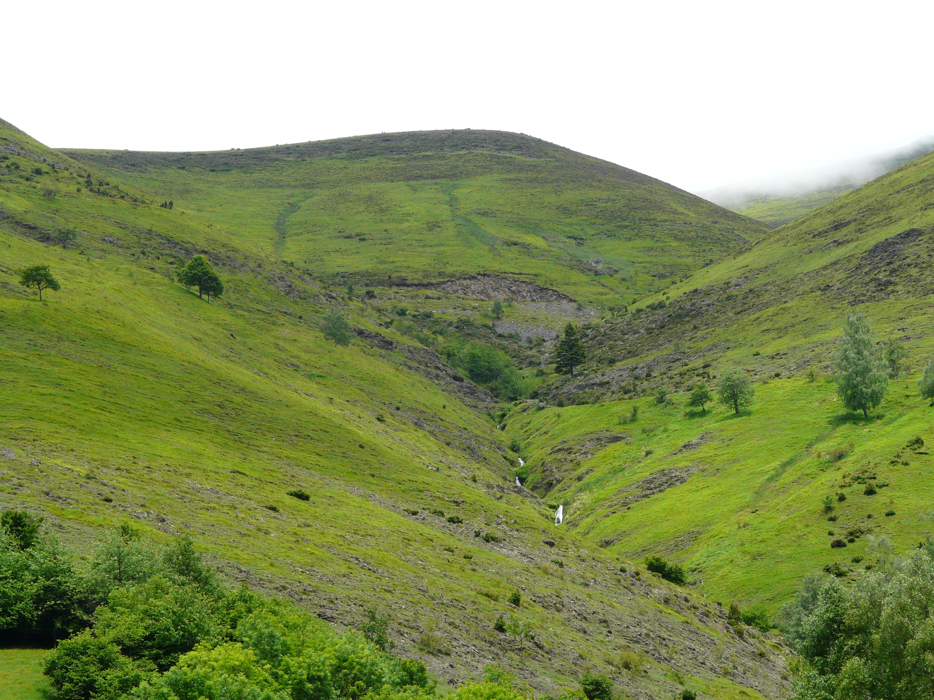 Ruisseau descendant du nord vers le village de Caubous, Haute-Garonne, France.